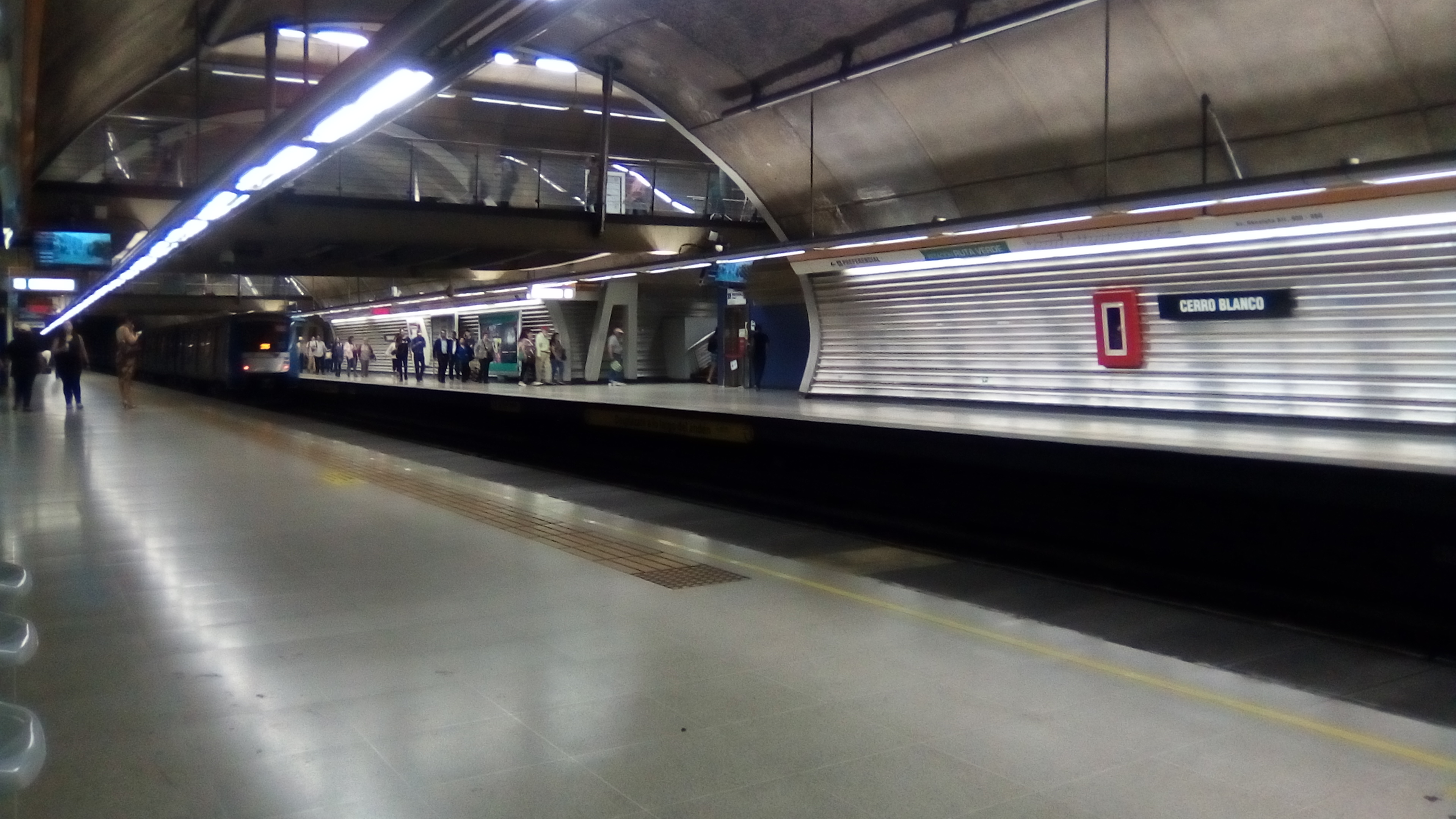 Estación Cerro Blanco (2018)